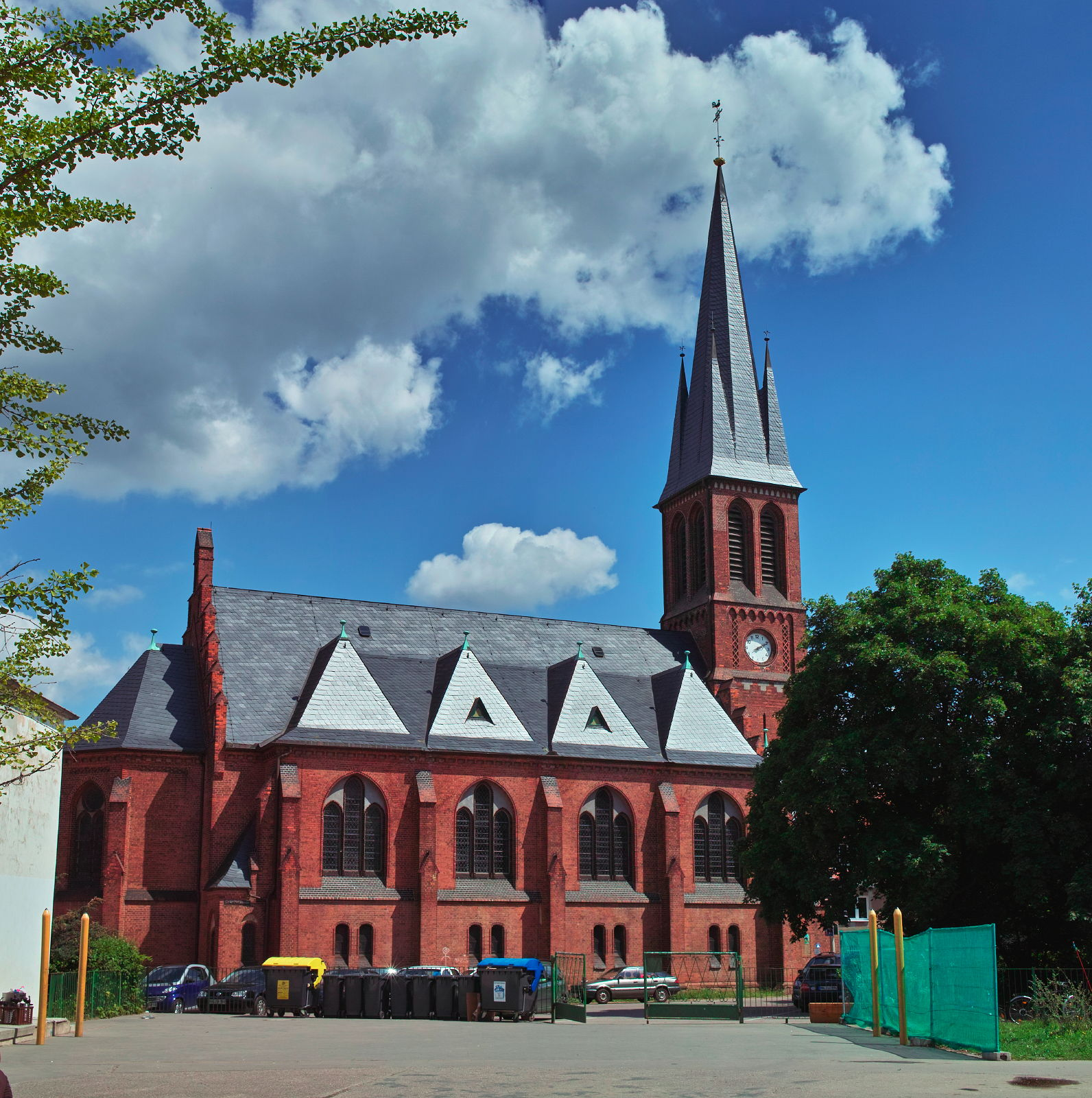 Petruskirche in Halle-Kröllwitz, Westfassade